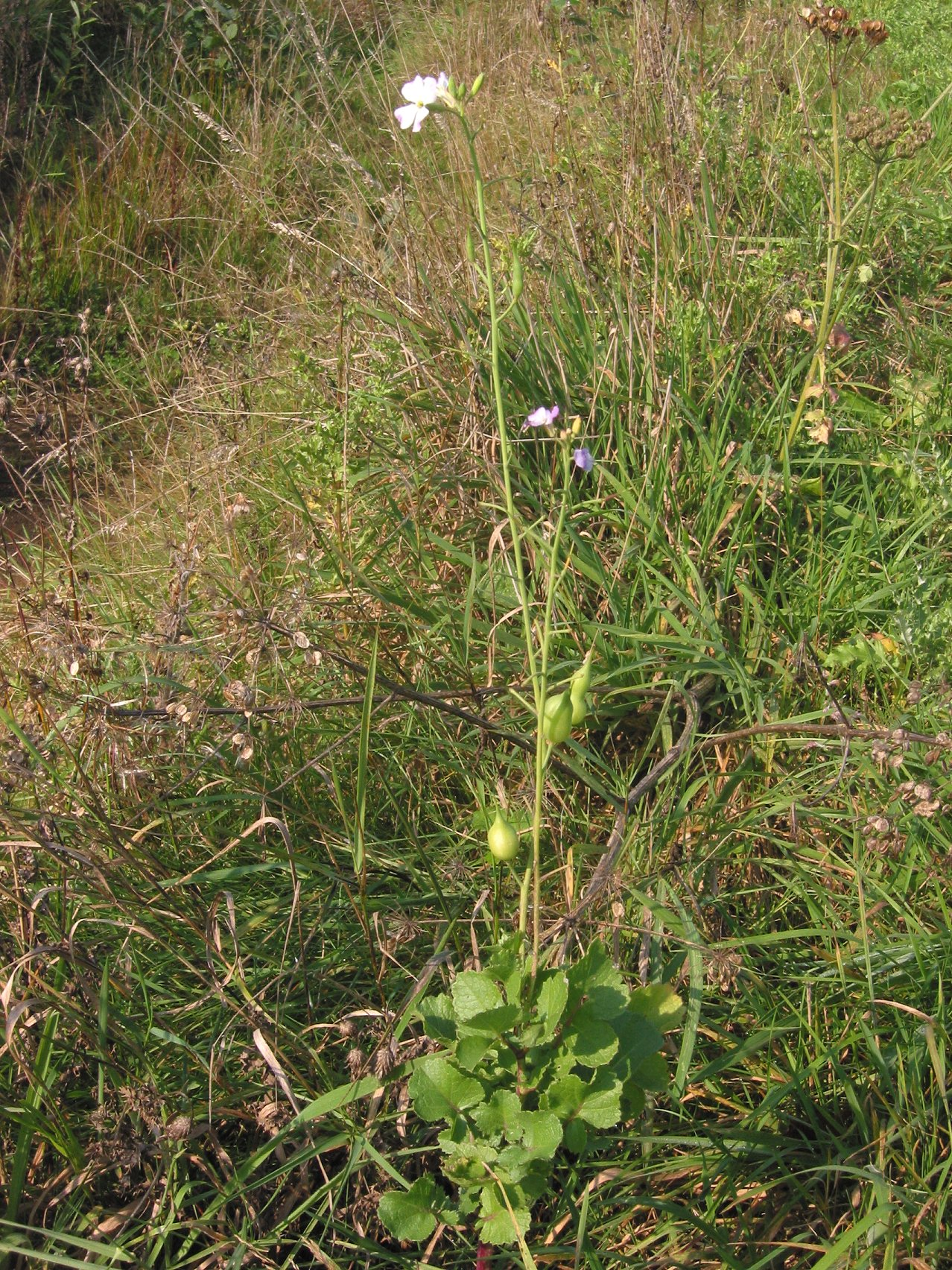 Bladrammenas (Raphanus sativus subsp. oleiferus) plant